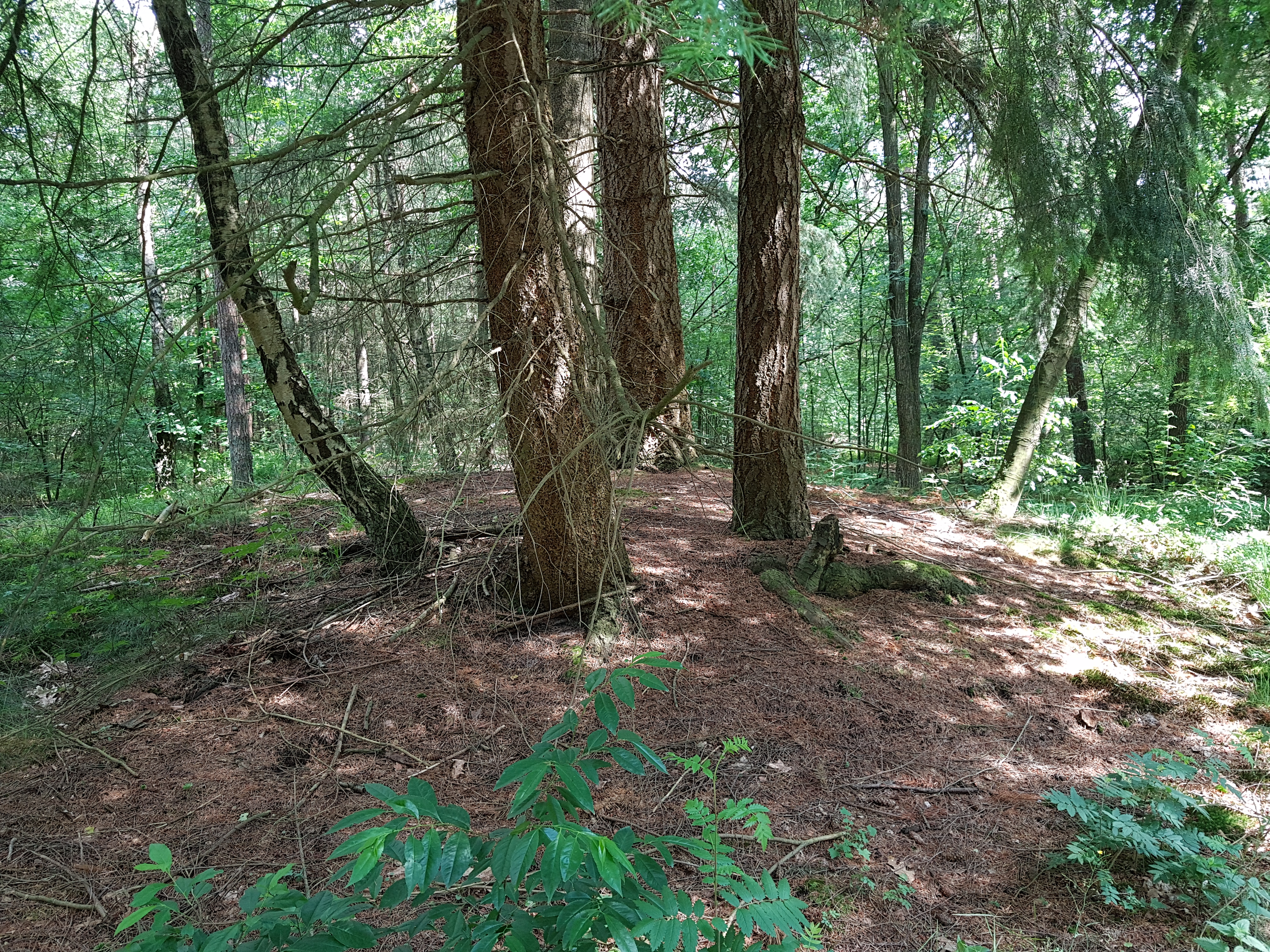 grafheuvel Maarnseberg II in het mollebos